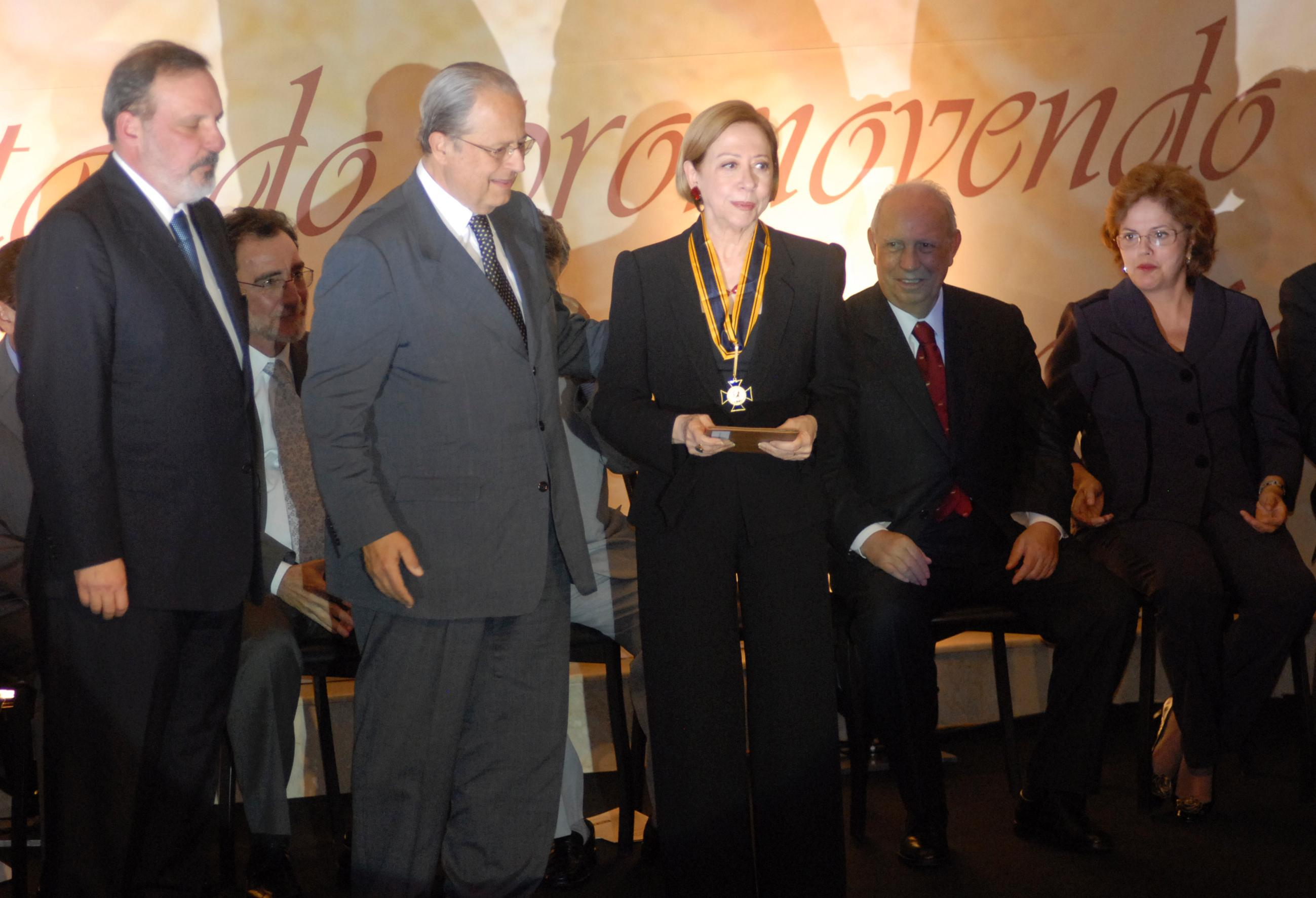 A atriz Fernanda Montenegro é prmiada durante cerimônia de entrega da Medalha Euvaldo Lodi, em comemoração aos 70 anos da CNI Foto: Fabio Rodrigues Pozzebom/ABr